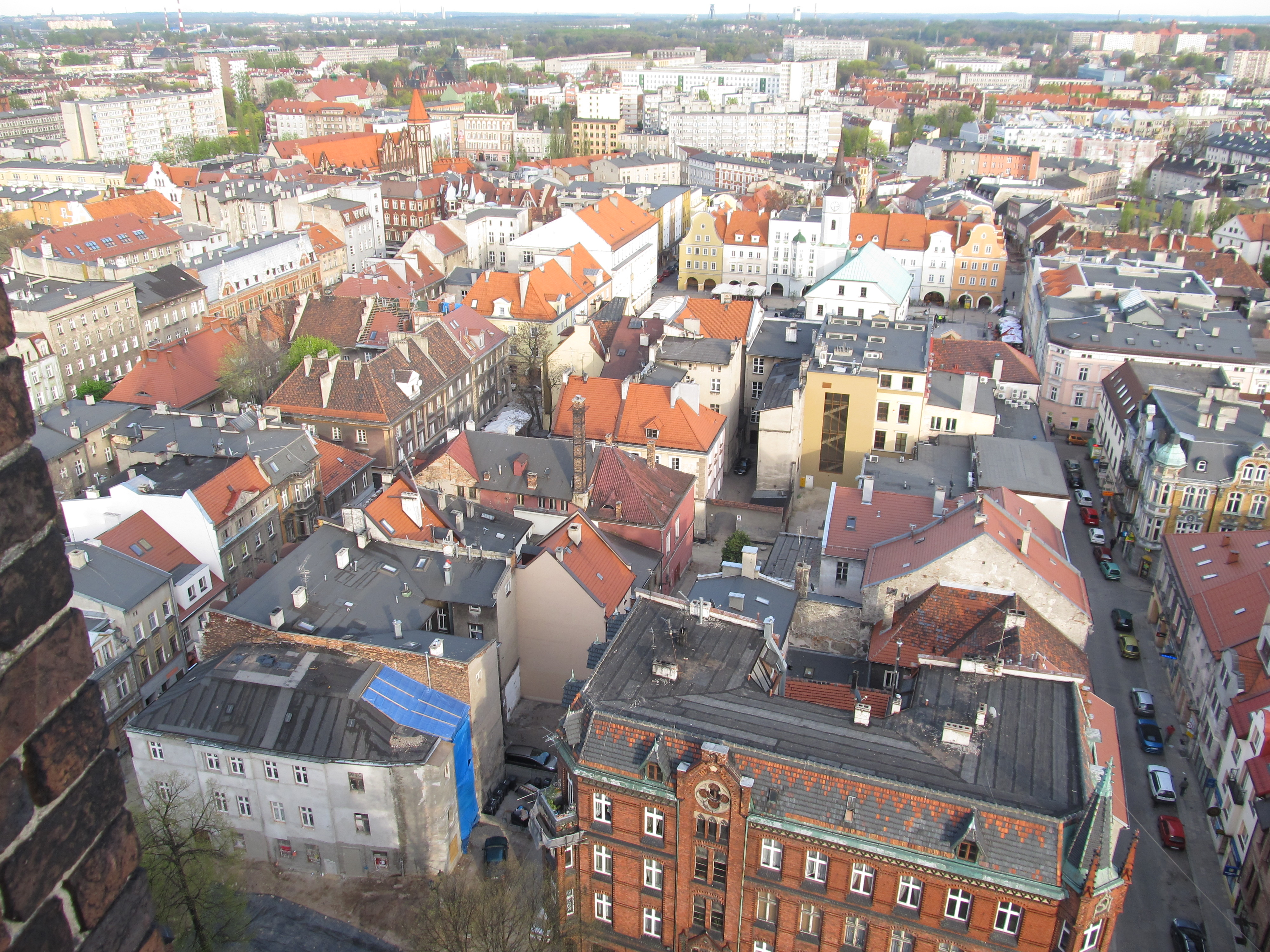 Miasto w ramach średniowiecznego założenia zamkniętego pierścieniem ulic: Górnych i Dolnych Wałów Gliwice, Gliwice